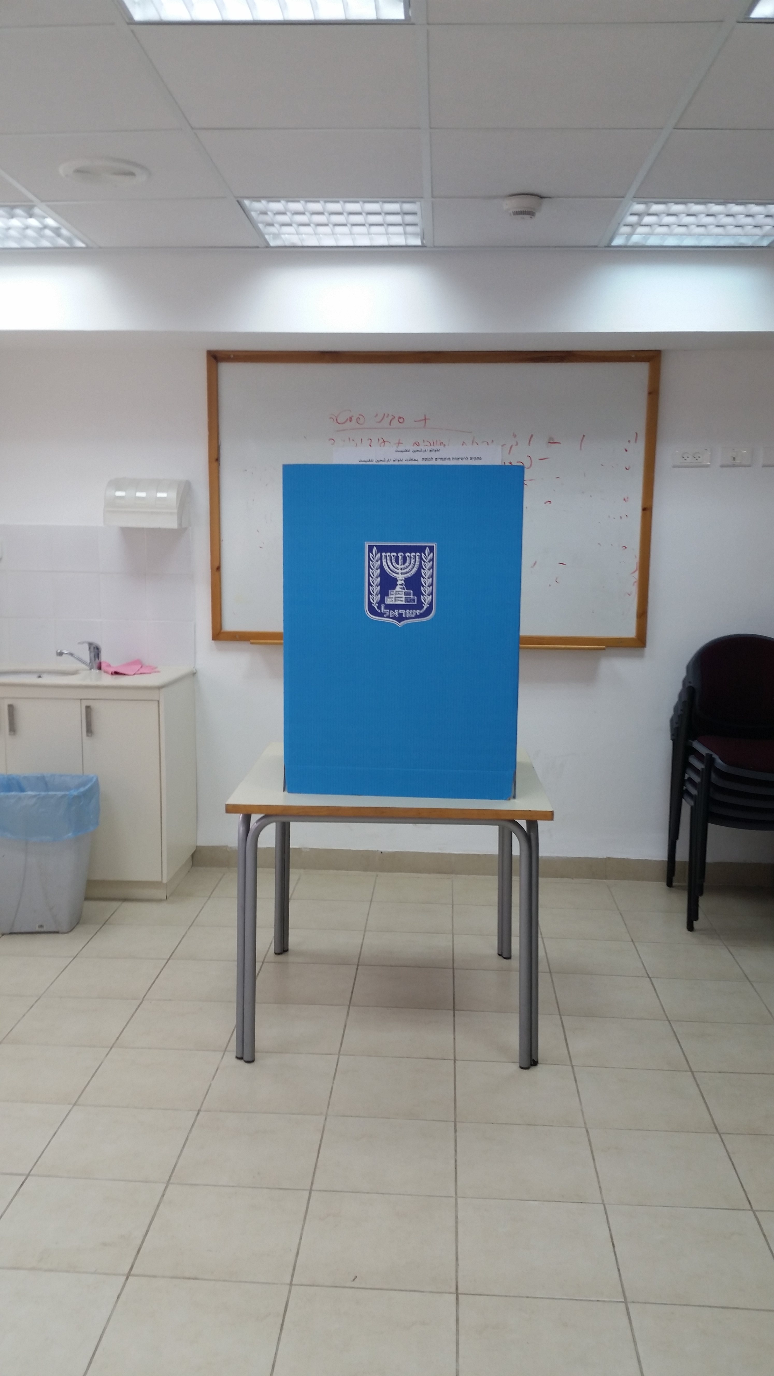 קלפי בחירות 2015 בקלפי מס 1 בגבעת נשר